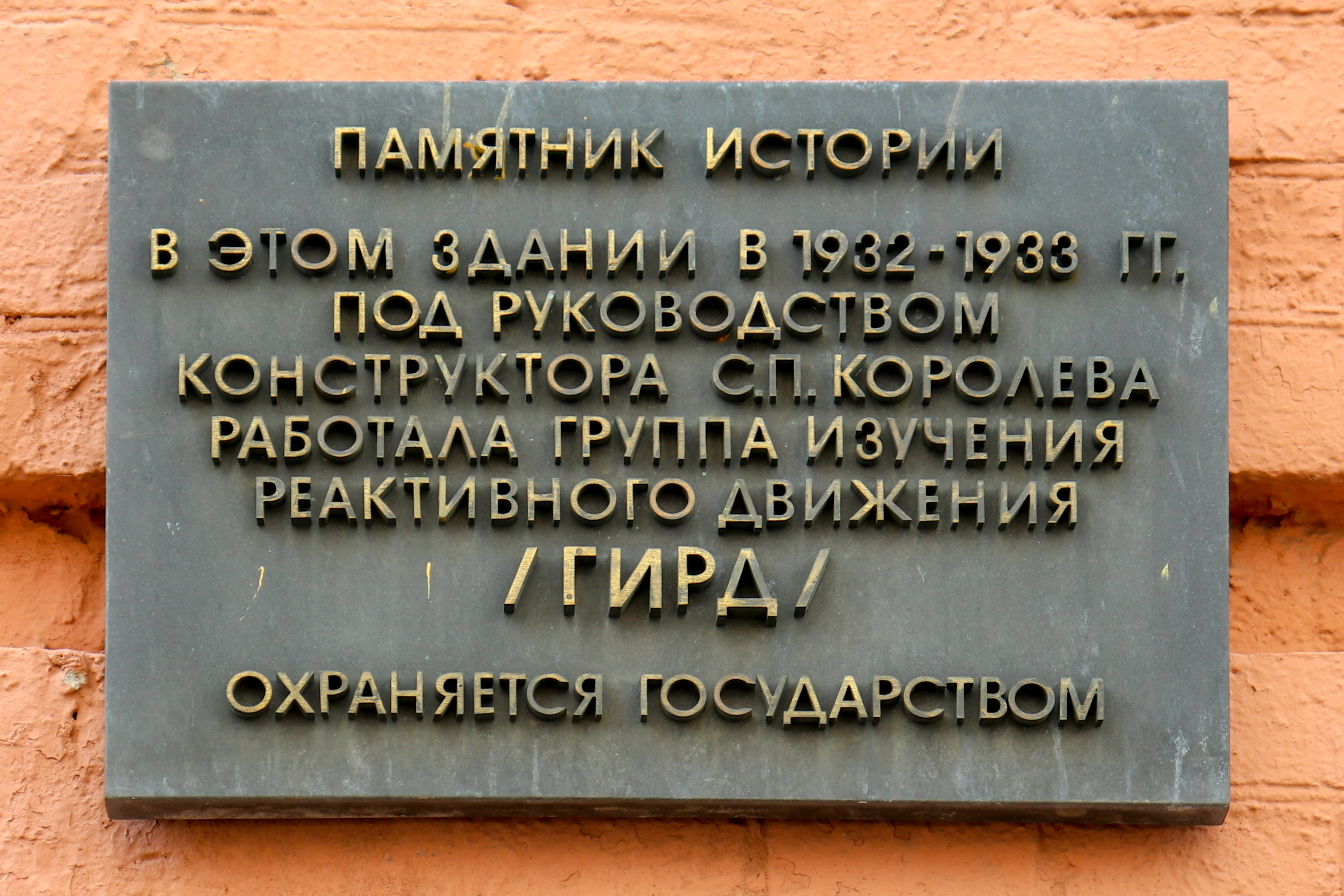 Типовая табличка объекта культурного наследия на здании в Москве (Садово-Спасская улица, 19, корпус 2): Памятник истории. В этом здании в 1932-1933 гг. под руководством конструктора С. П. Королева работала группа изучения реактивного движение /ГИРД/. Охраняется государством